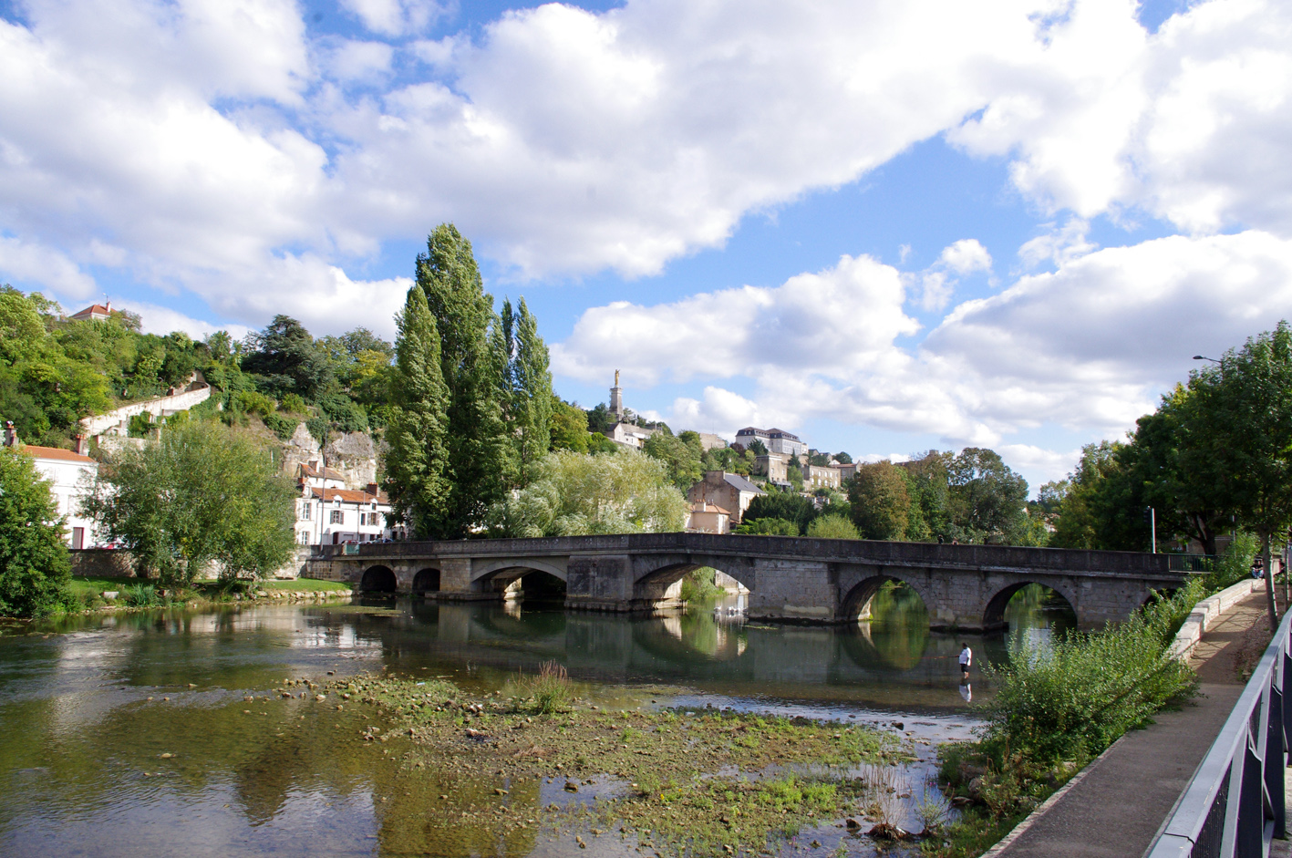 Le Pont Joubert sur le Clain à Poitiers